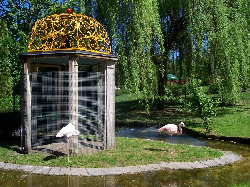 Stresa - Parco di Villa Pallavicino